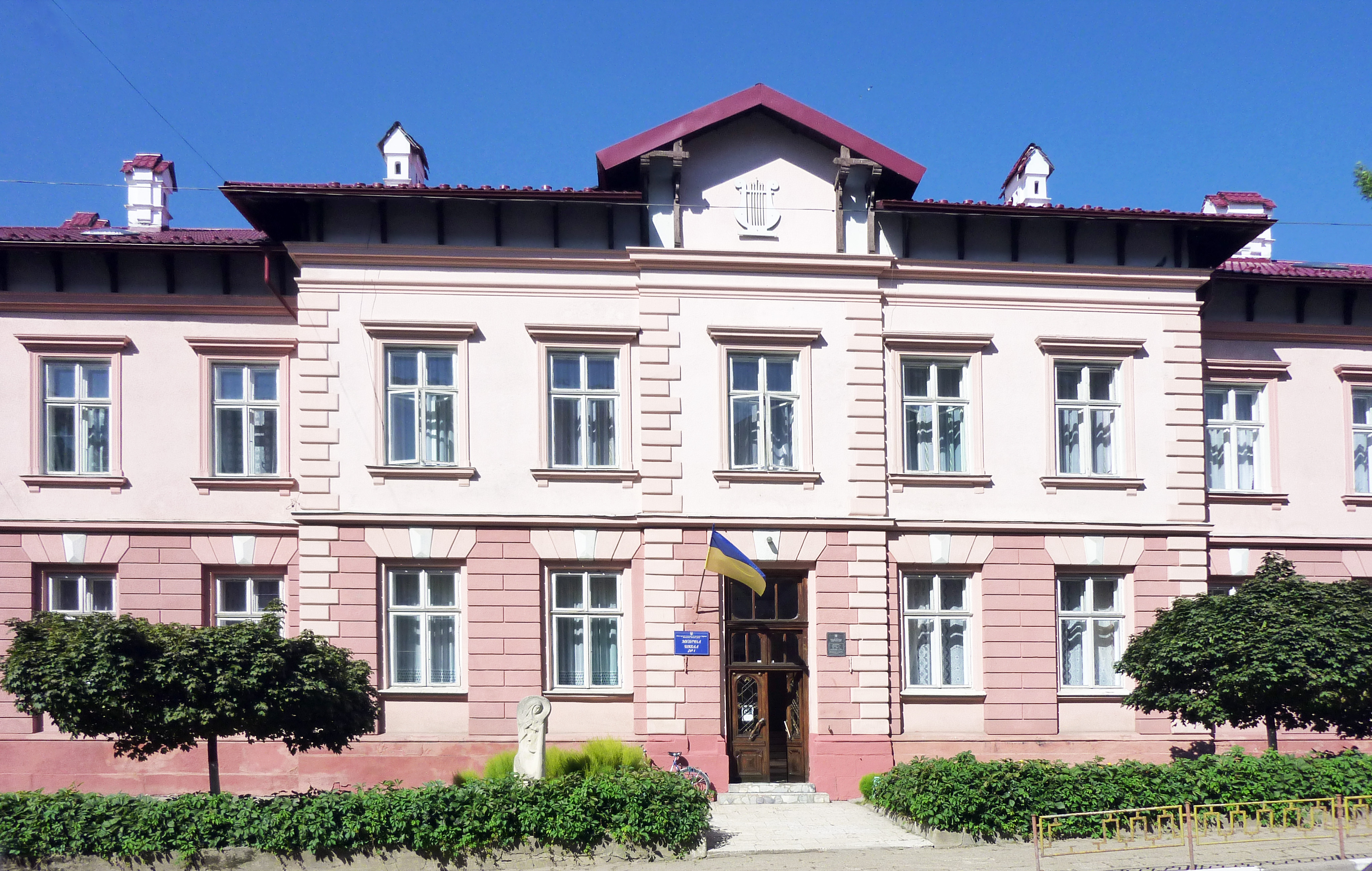 Історія споруди починається у середньовіччі, коли поруч із замком стояв панський будинок. Його було розібрано у 1918 році, а через рік-два його перебудували у судову управу. Хоча, за іншими даними, споруда збудована у другій половині ХІХ століття. Що ж — поки що подаю дві версії, а тема забудови Калуша залишається перспективною у плані її вивчення та дослідження. Саме приміщення музичної школи споруджене у стилі класицизму. До 1939 року тут знаходився повітовий суд, а далі — в’язниця НКВС. Коли у Калуші розпочав навчання хіміко-технологічний технікум, приміщення передали навчальному закладу, а згодом — музичній школі. 1 серпня 1999 року на приміщенні школи відкрито пам’ятну дошку закатованим патріотам України (скульптор — Ігор Семак, архітектор — Петро Макогін).